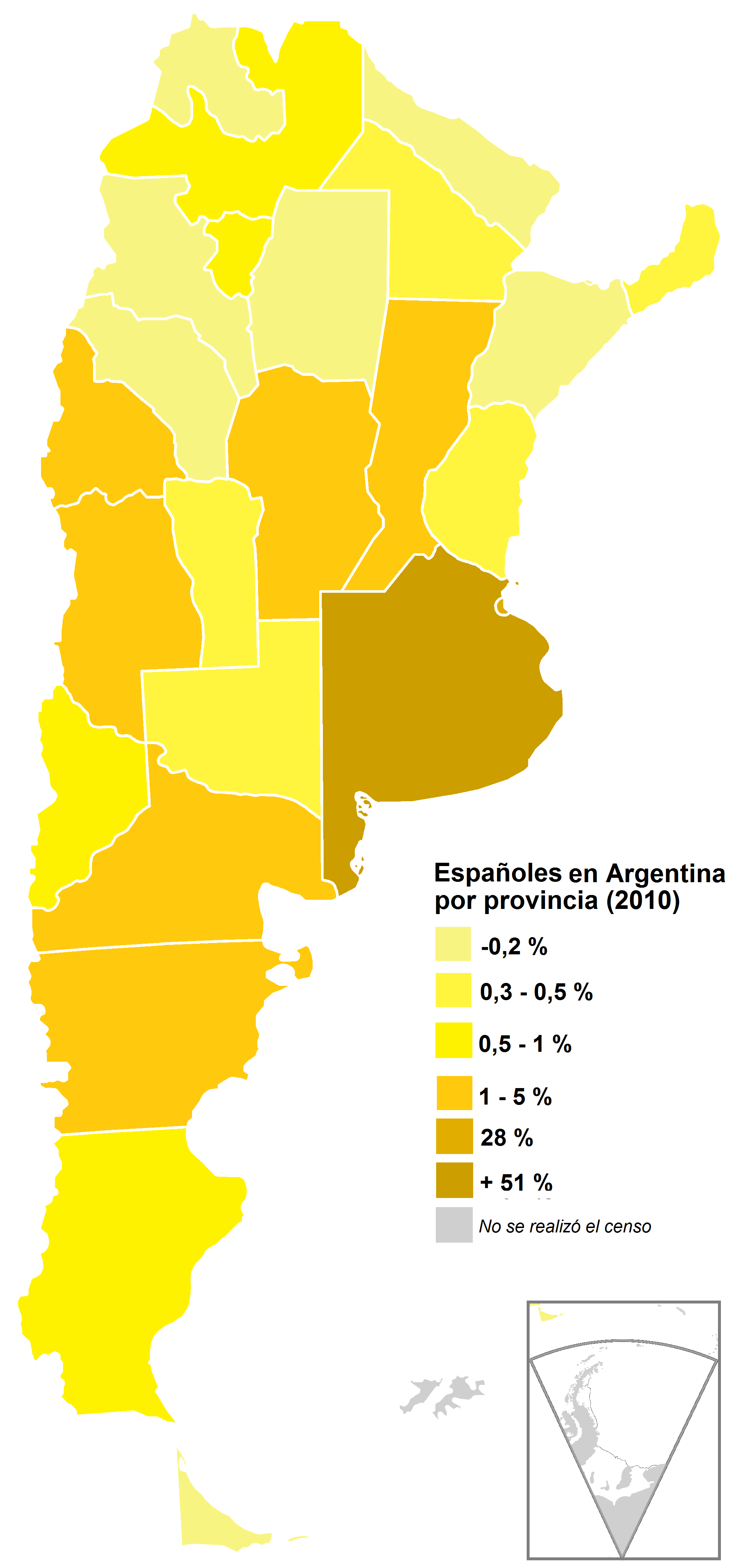 República Argentina por provincia. Población nacida en España, en porcentaje. Año 2010. Fuente: Censo 2010 - INDEC.